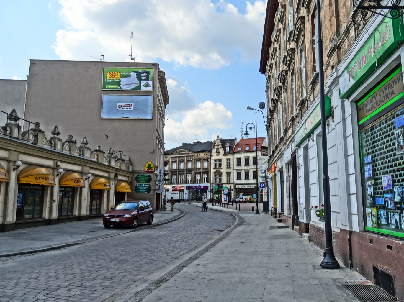 Ulica Podwale w Bydgoszczy